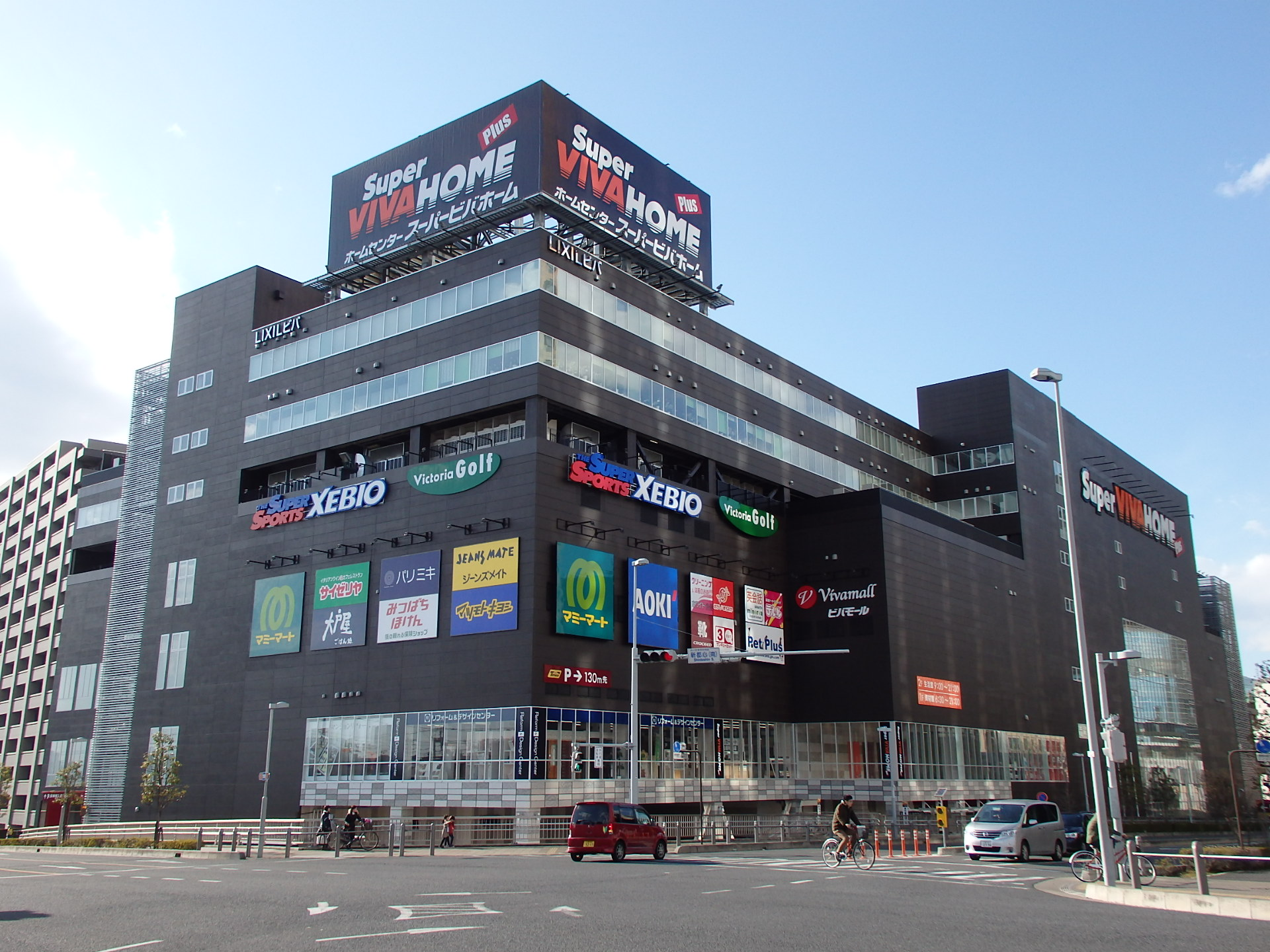 LIXILビバ本社